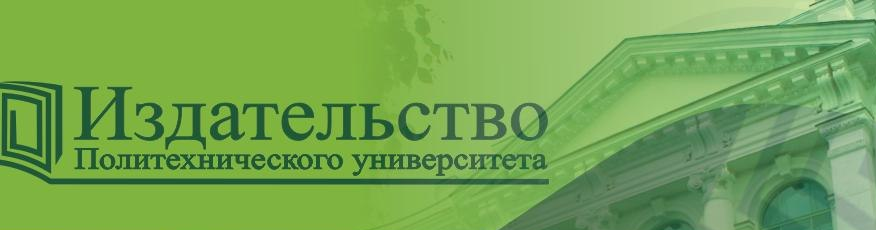 Издательство Политехнического Университета